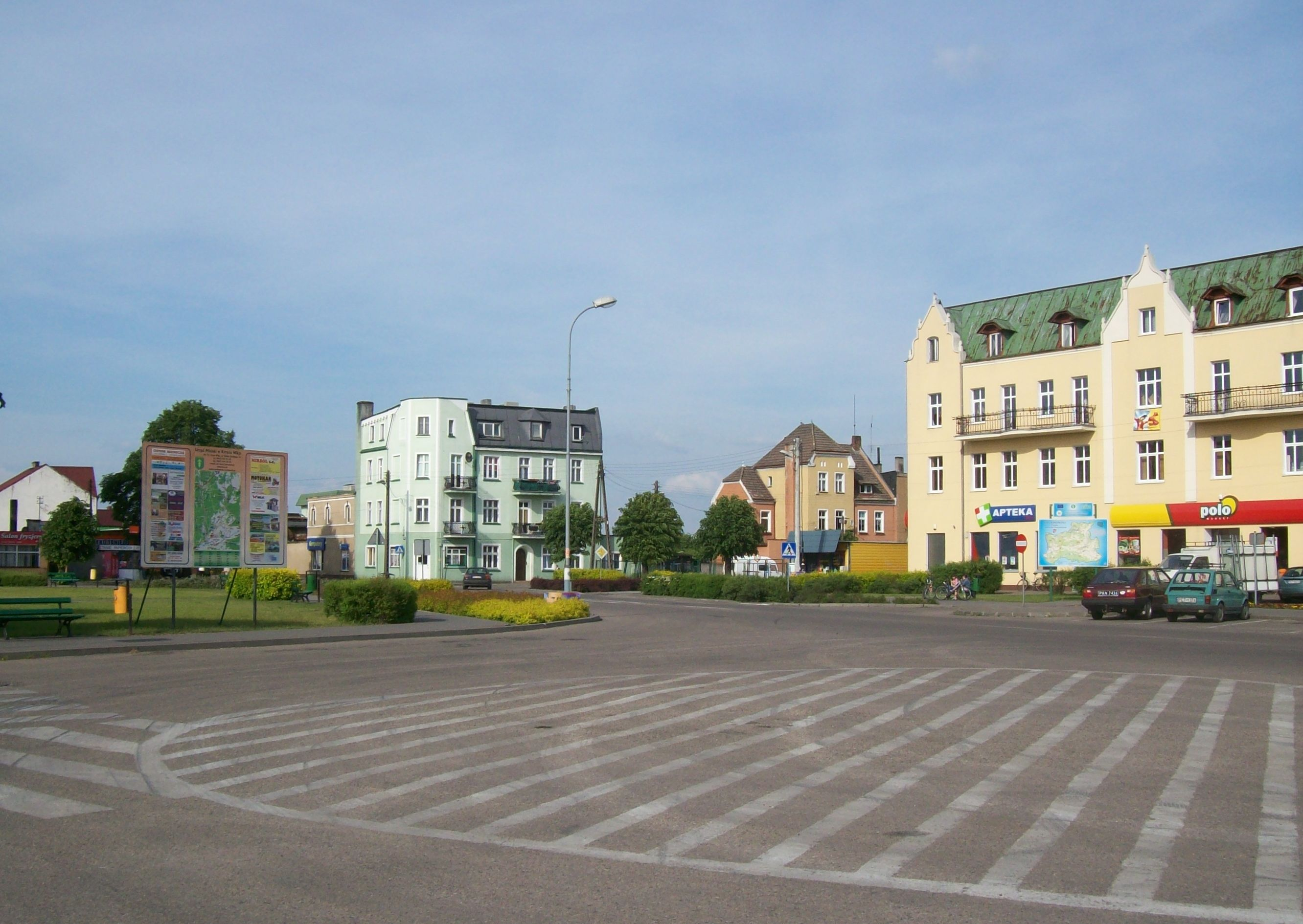 Centrum Krzyża Wlkp.